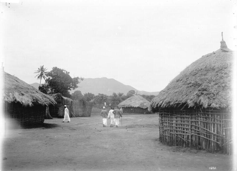 Morogoro, Dorfstrasse